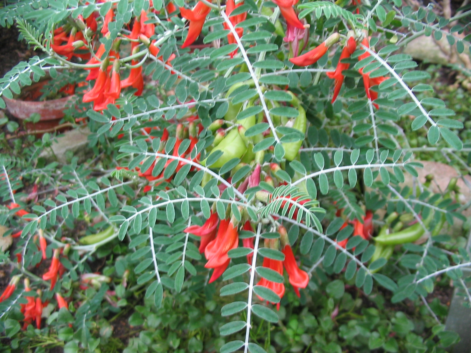 Sutherlandia frutescens - Bot. Garten Berlin Dahlem